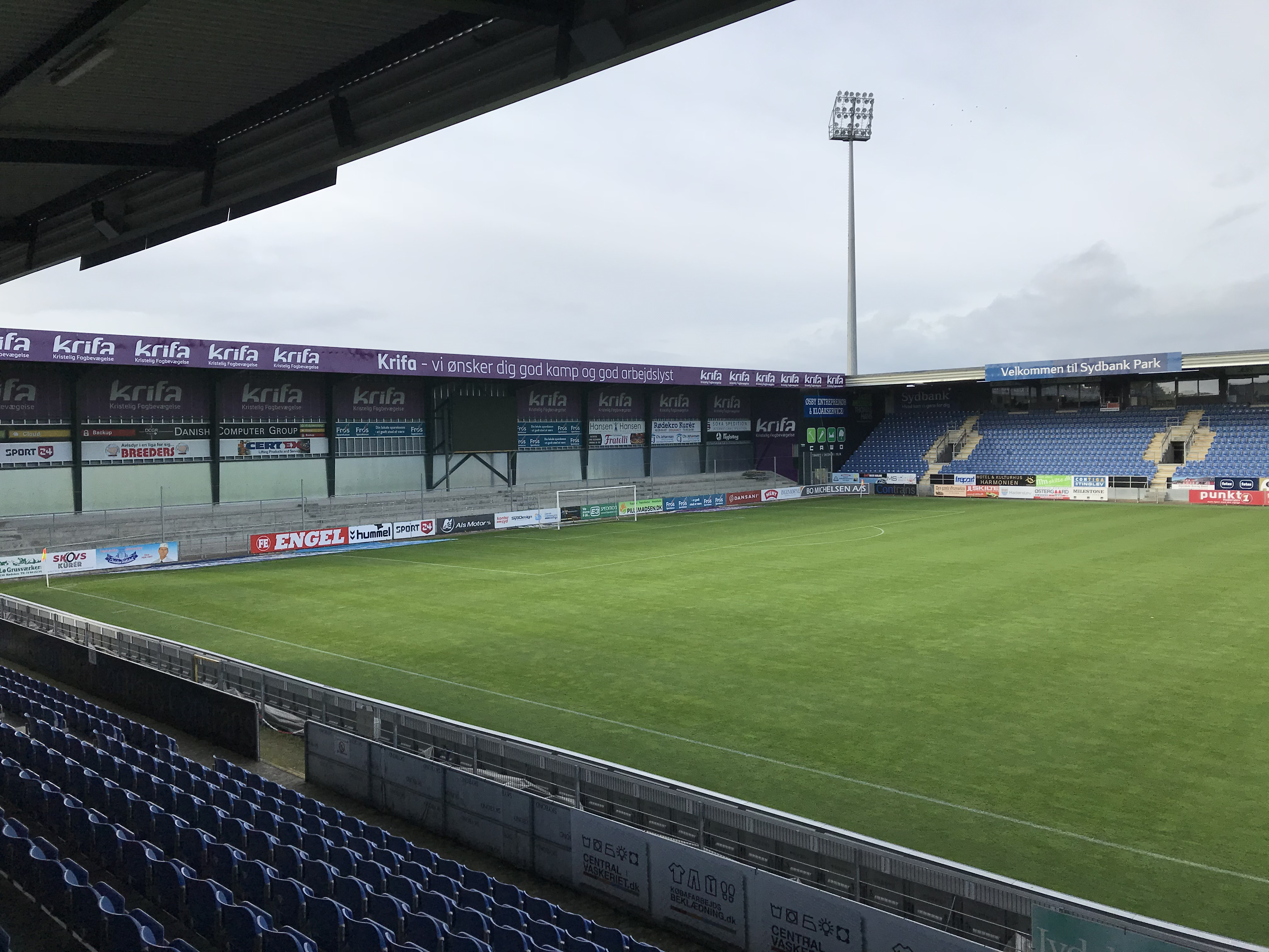 Den nye endetribune på Sydbank Park september 2018